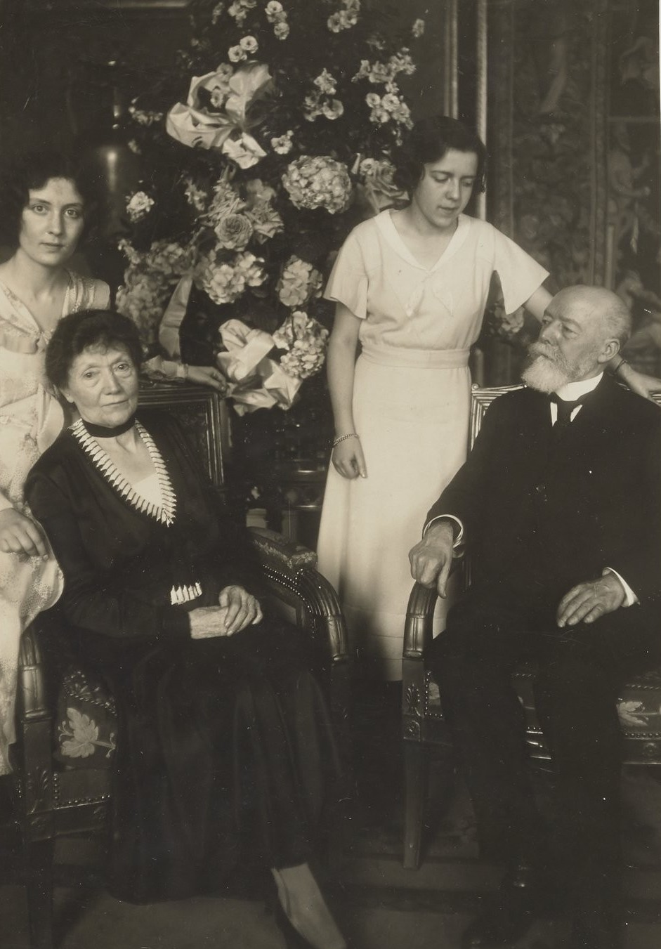 Le président Paul Doumer (à droite) avec sa femme, Blanche (à gauche), et deux de ses filles (debout).